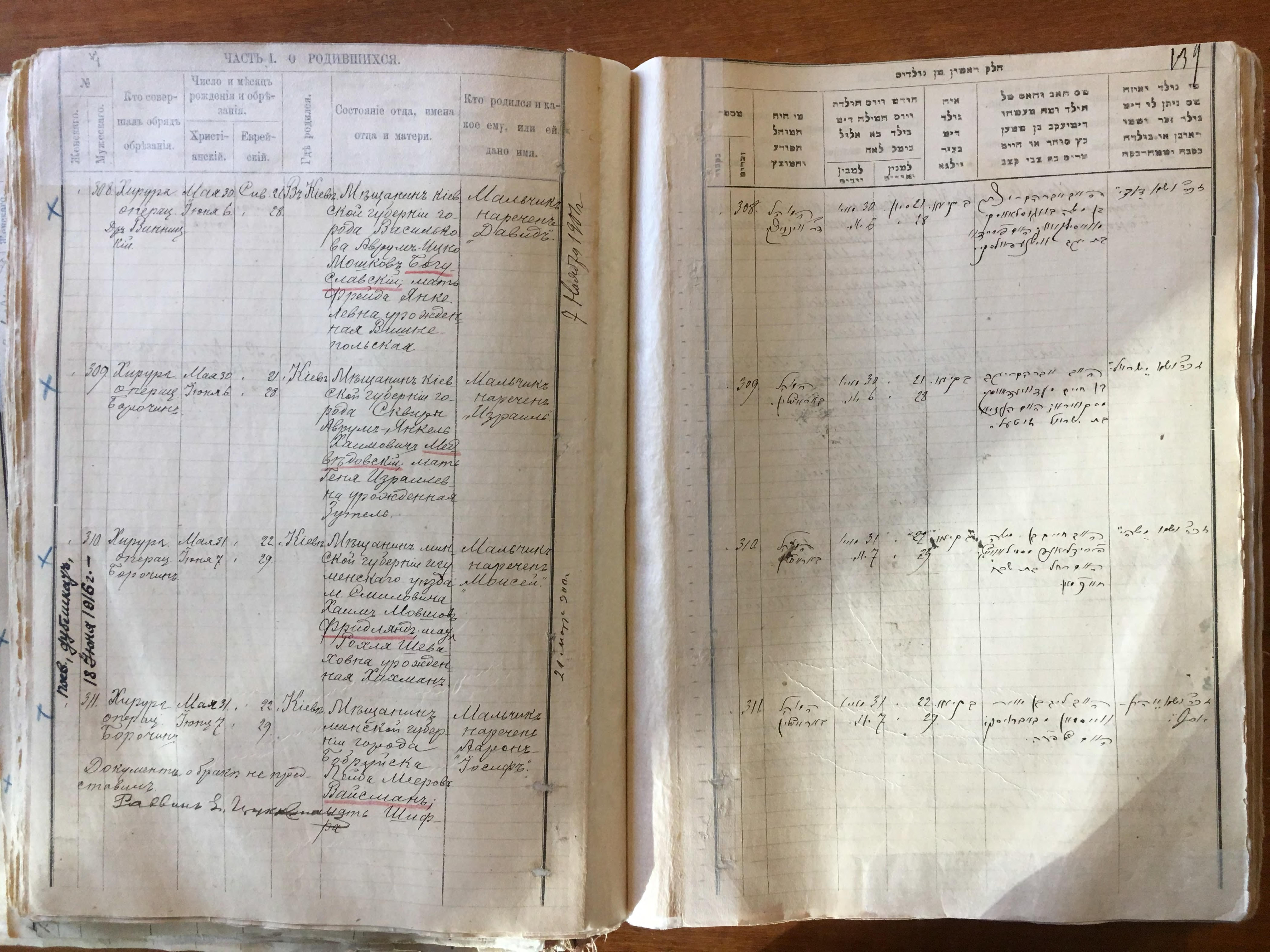 Метрическая запись о рождении Михаила Фридлянда (Михаила Кольцова)